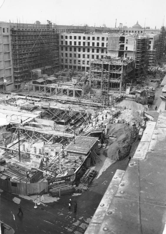 Neubau des "Reichsluftfahrtministeriums"